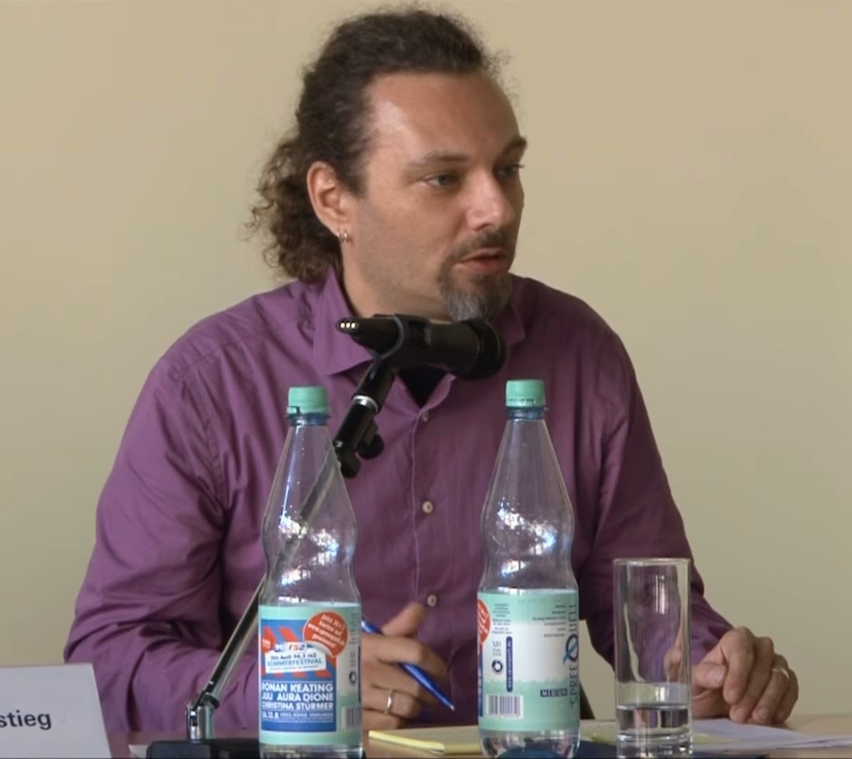 Venezuela ist immer noch ein bürgerlicher kapitalistisch organisierter Staat aber die gesellschaftliche Umgestaltung hat die Klassenkämpfe in vielen Bereichen verstärkt oder erst zugelassen. Beitrag aus: «Den Betrieb übernehmen. Einstieg in Transformation?» Panel: Fit für den Markt oder den Markt überwinden? Widersprüche von Genossenschaften & Belegschaftsbetrieben und ihre Bearbeitung 3. bis 5.11.2011, Rosa-Luxemburg-Stiftung, Berlin